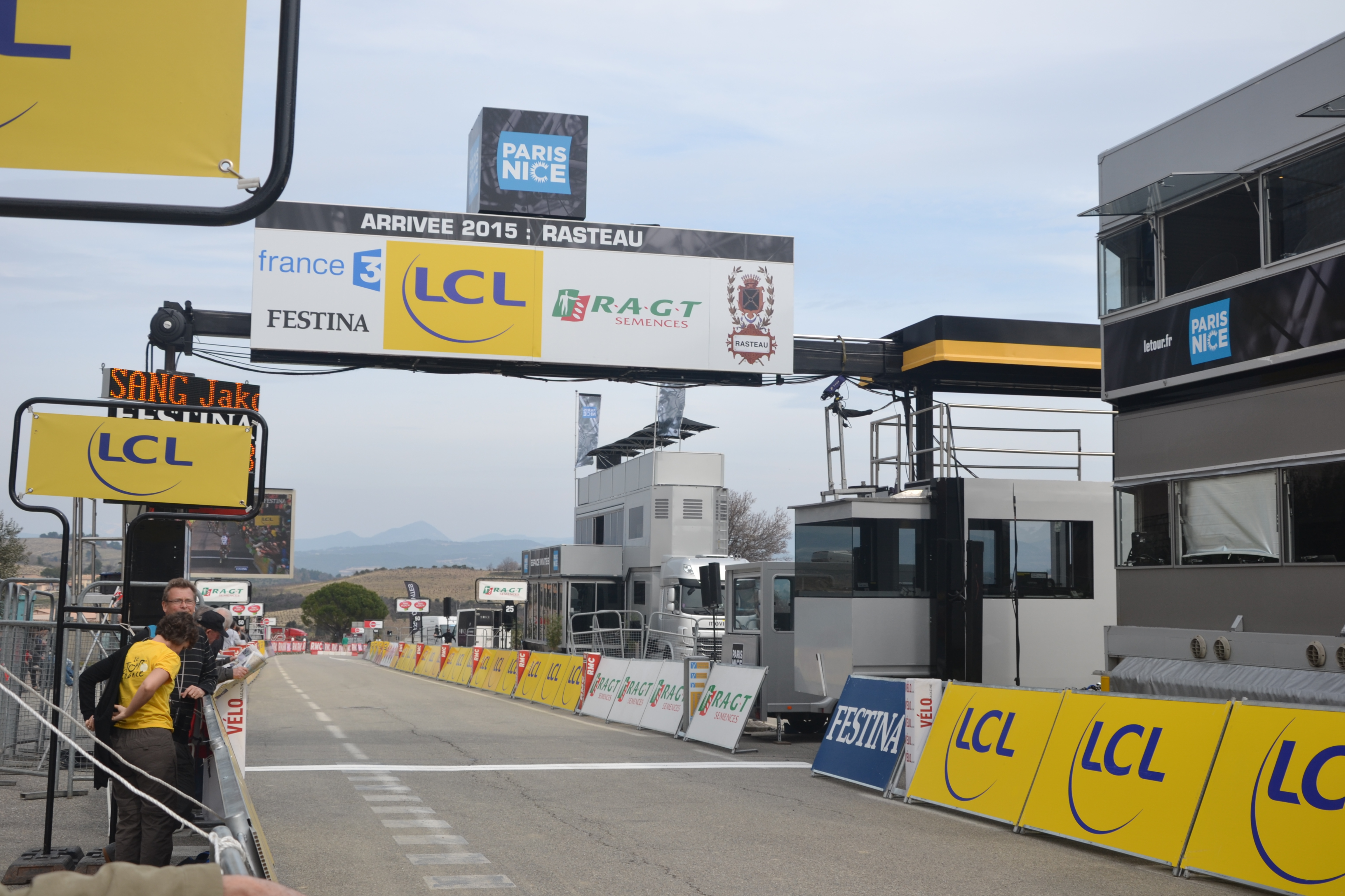 lors de l'étape du Paris - Nice à Rasteau